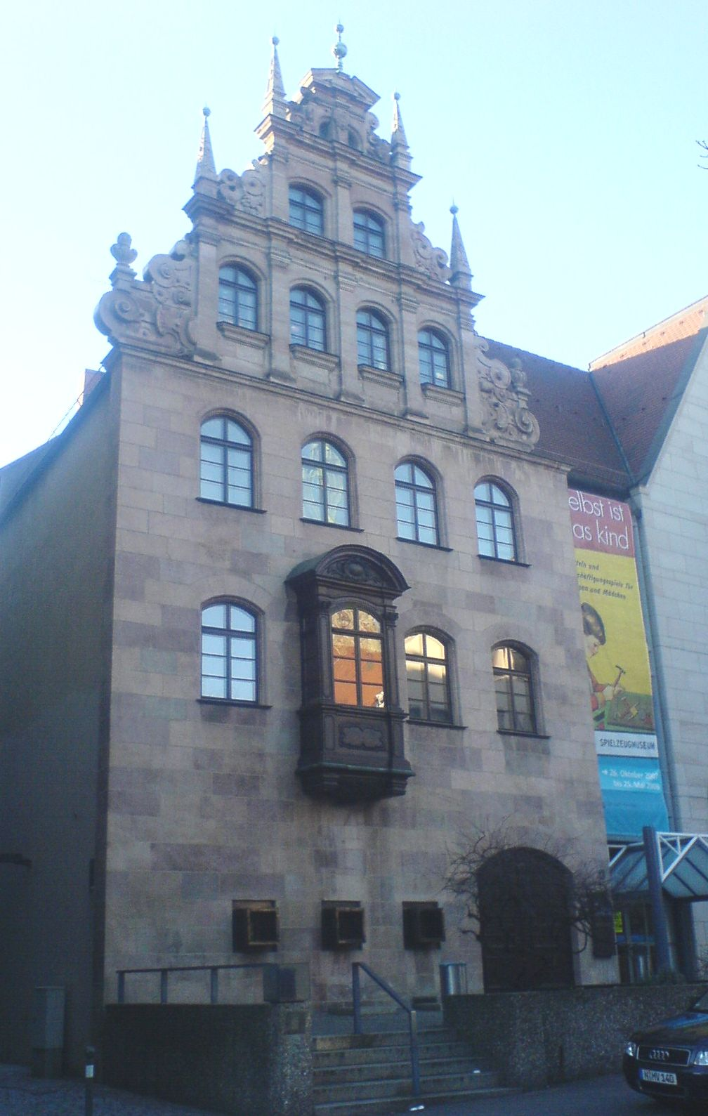 Toy Museum Nuremberg, Germany